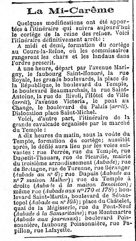 Annonce de deux cortèges pour la Mi-Carême 1901 à Paris. L'Intransigeant, page 4, 1ère colonne.